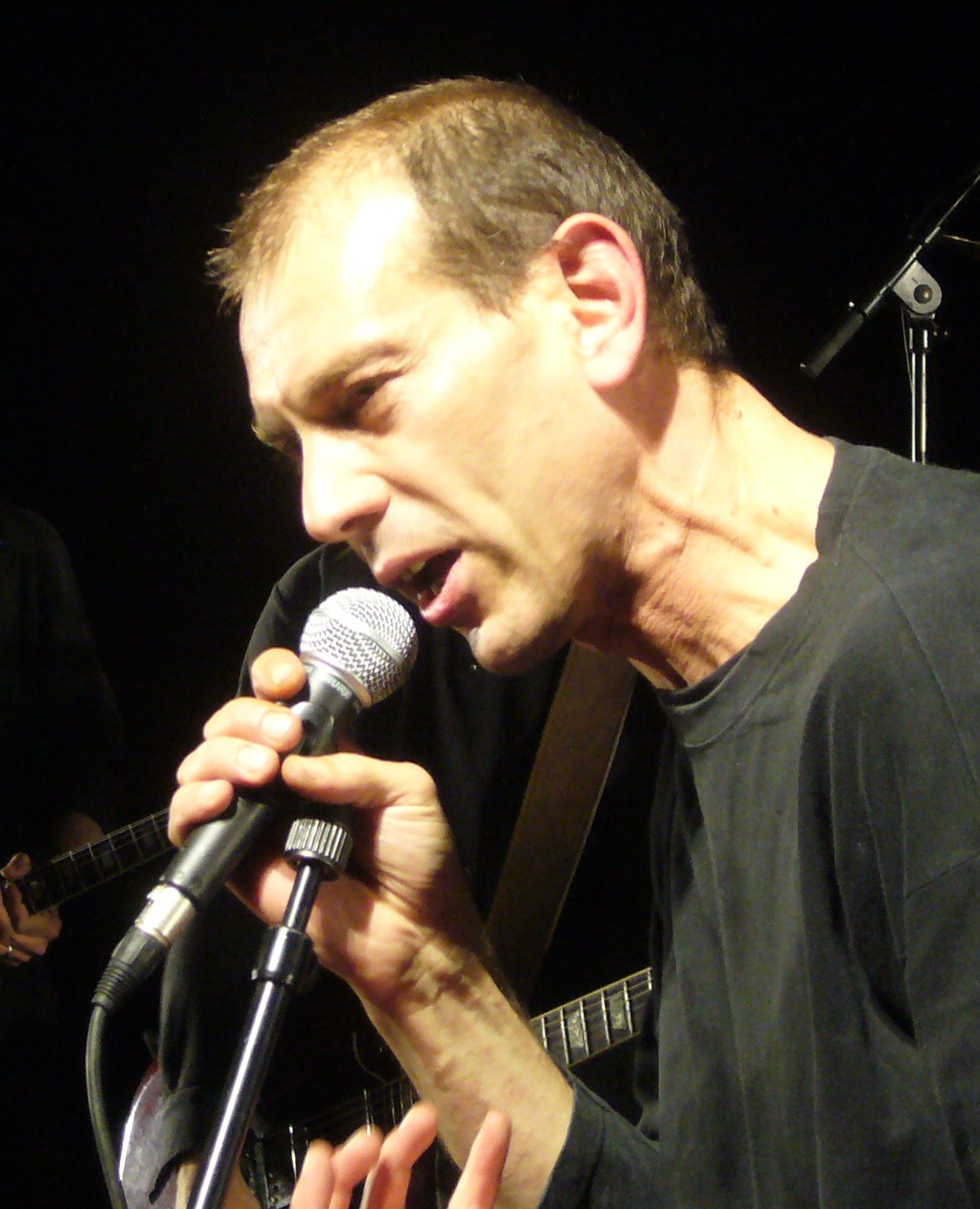 Christian Olivier, chanteur des Têtes Raides. Vue prise par Hervé Suaudeau (Utilisateur:Suaudeau) lors du concert des Têtes Raides à Villeparisis le 7 octobre 2006.